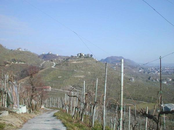 Paolo Subiaco, foto delle colline di Col San Martino, TV